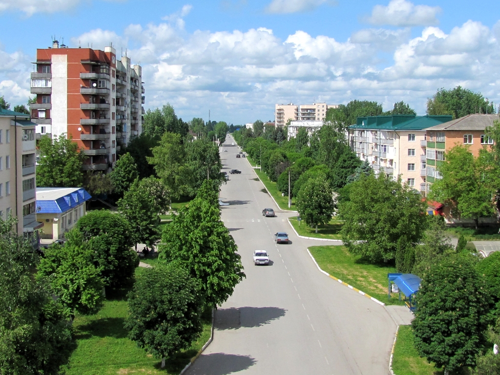 Город Майский в КБР